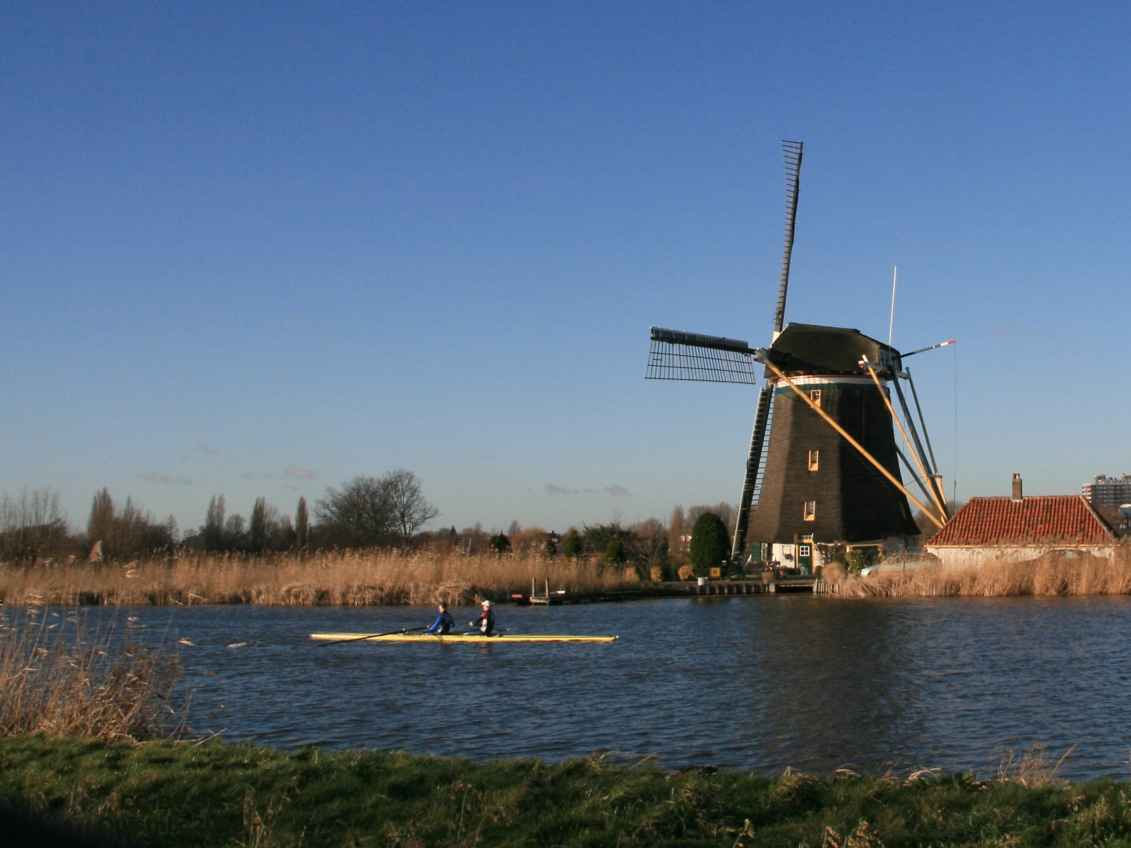 Rotterdam-Hillegersberg, De Prinsenmolen, gezien vanaf de overzijde van de Rotte, met roeiers